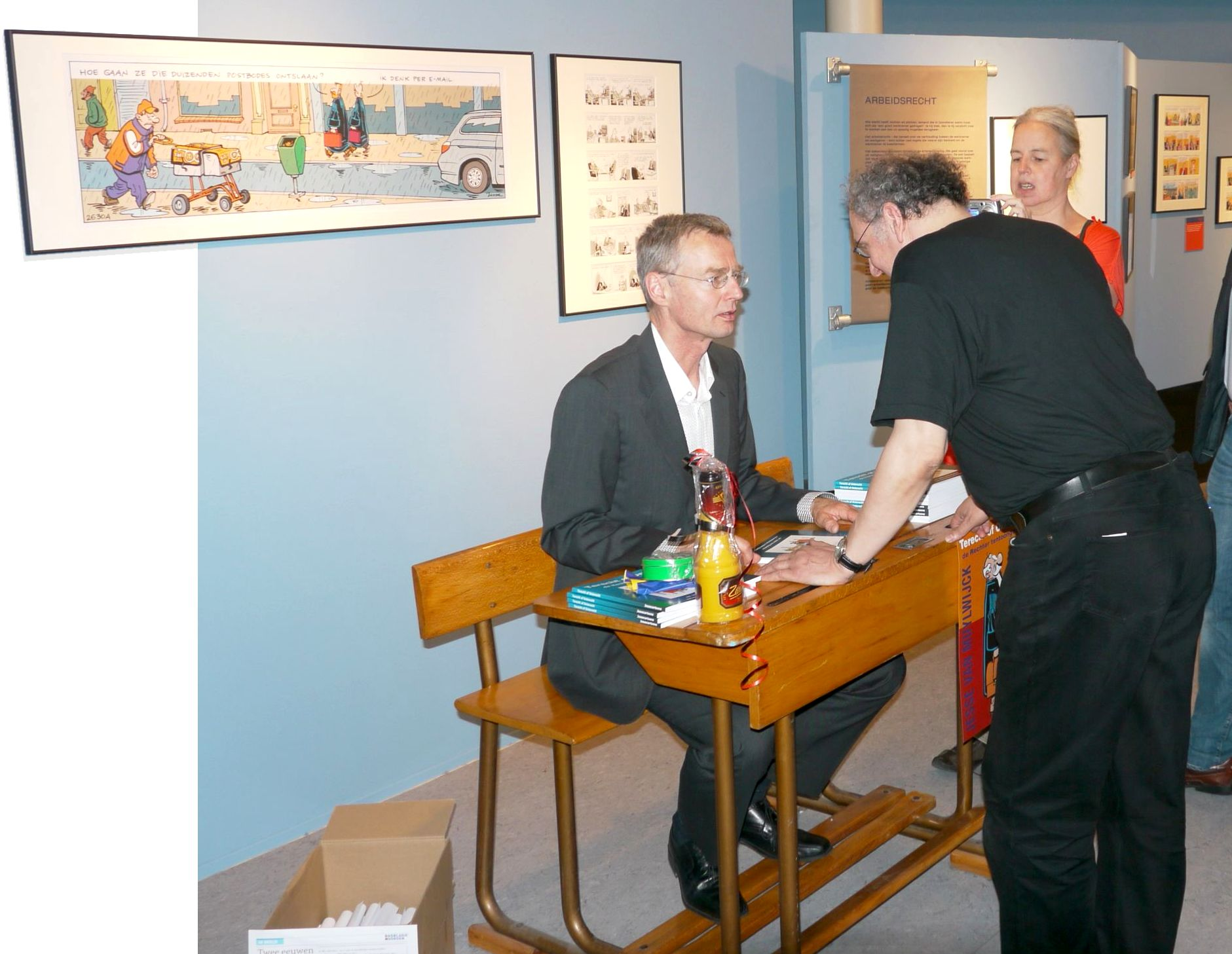 Jesse van Muylwijck tijdens signeersessie op de tentoonstelling 'Terecht of onterecht' in het Nederlands Stripmuseum te Groningen, ter gelegenheid van 200 jaar rechtspraak in Nederland.